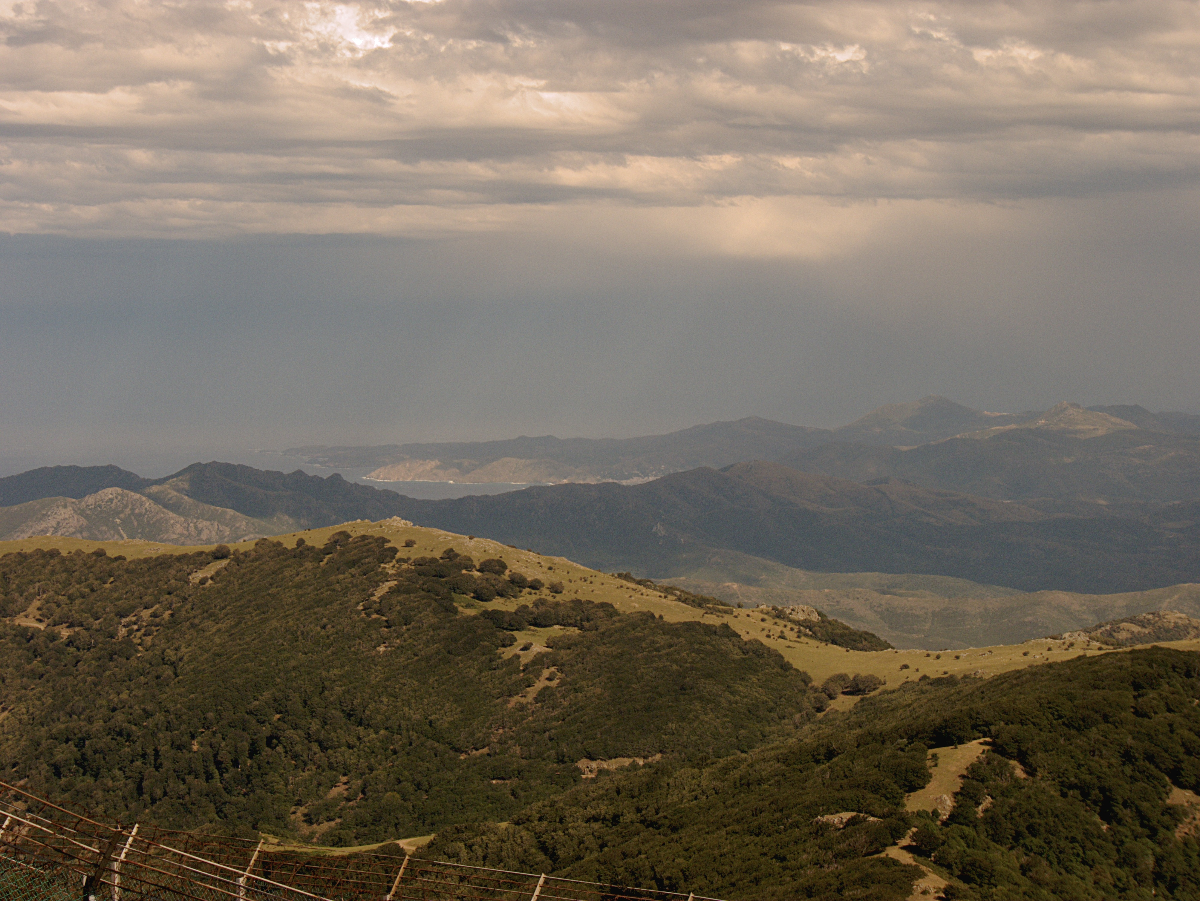 Crête de la frontière de la collada de l'Orri depuis le Pic du Néoulous, Montesquieu-des-Albères (Pyrénées-Orientales, Languedoc-Roussillon, France), Laroque-des-Albères (Pyrénées-Orientales, Languedoc-Roussillon, France), la Jonquera (Haut-Ampurdan, Gérone, Catalogne, Espagne)